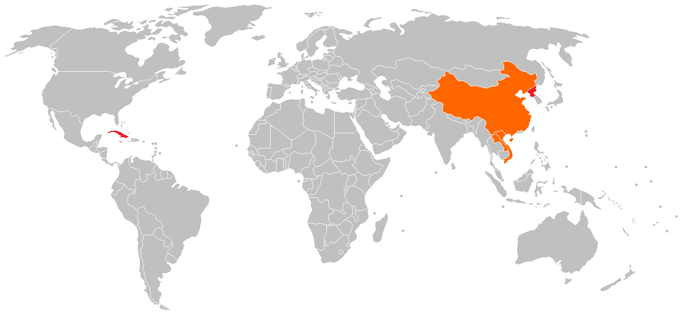 Estados que en la actualidad se declaran constitucionalmente a sí mismos como "socialistas" bajo un sistema de partido único. Estados puramente socialistas (Cuba, Corea del Norte) Estados que se declaran socialistas y unipartidistas, pero mantienen una economía de mercado. (República Popular China, Laos, Vietnam)